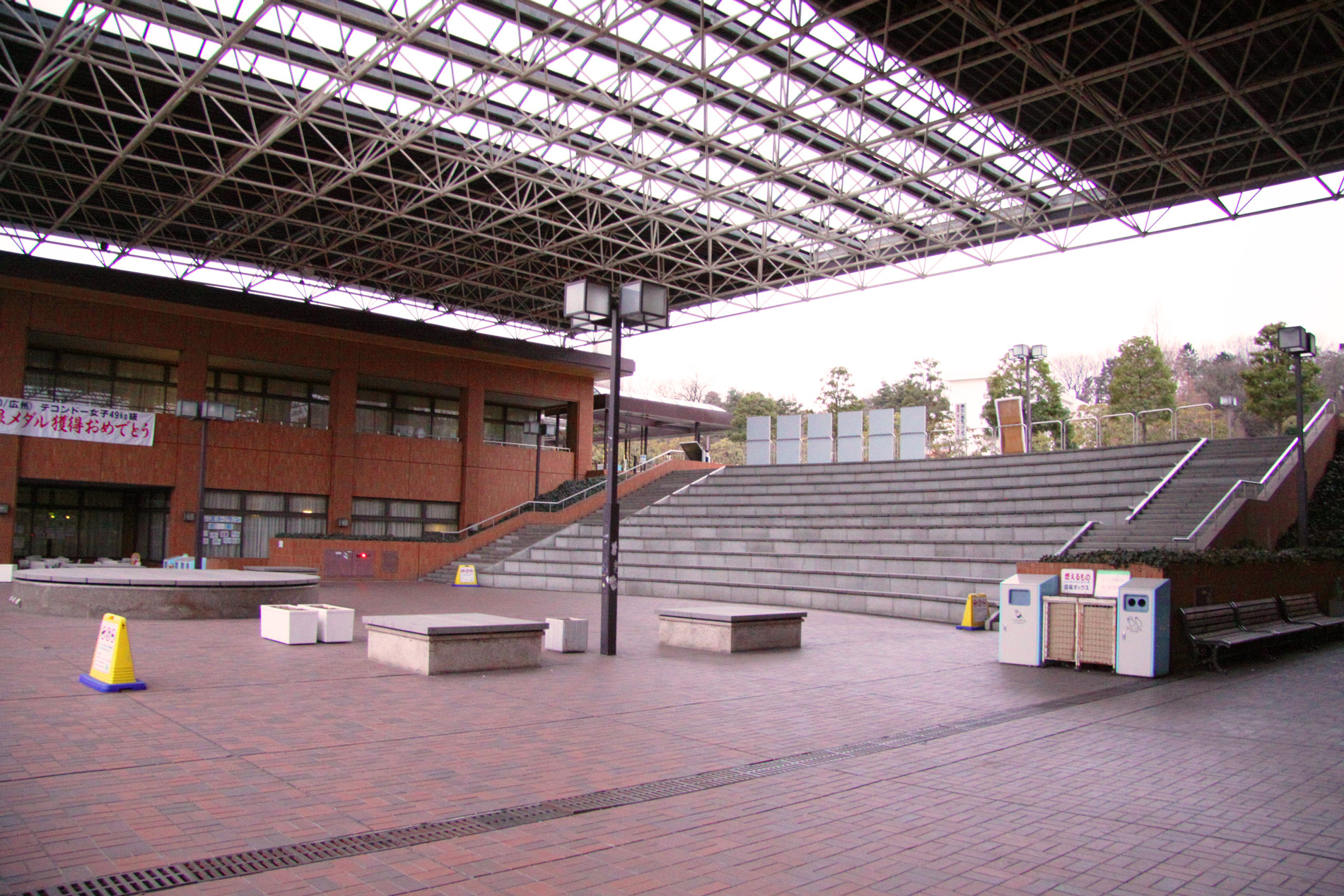 大東文化大学東松山キャンパス キャンパスプラザ